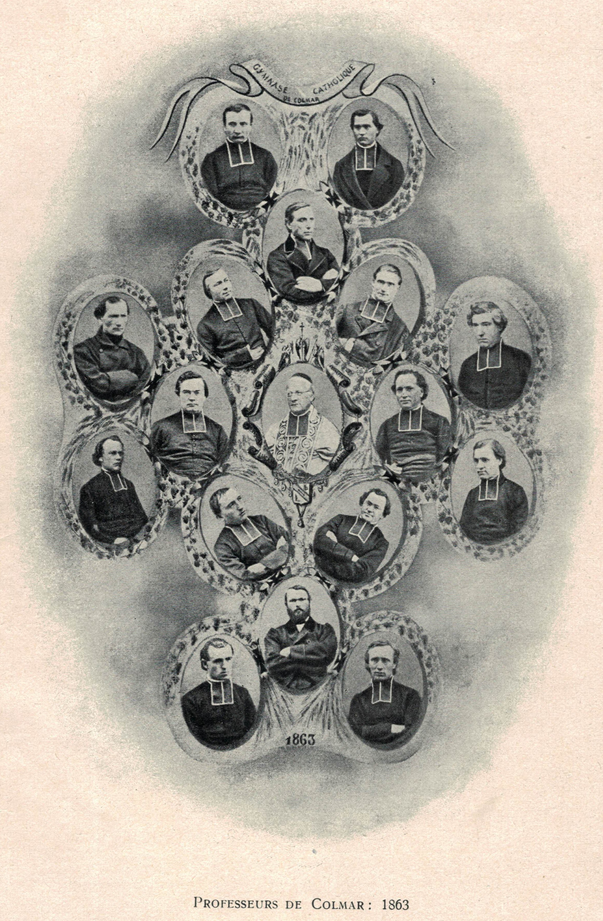 Élèves du collège libre - les professeurs de Colmar en 1863 (édition de 1908)